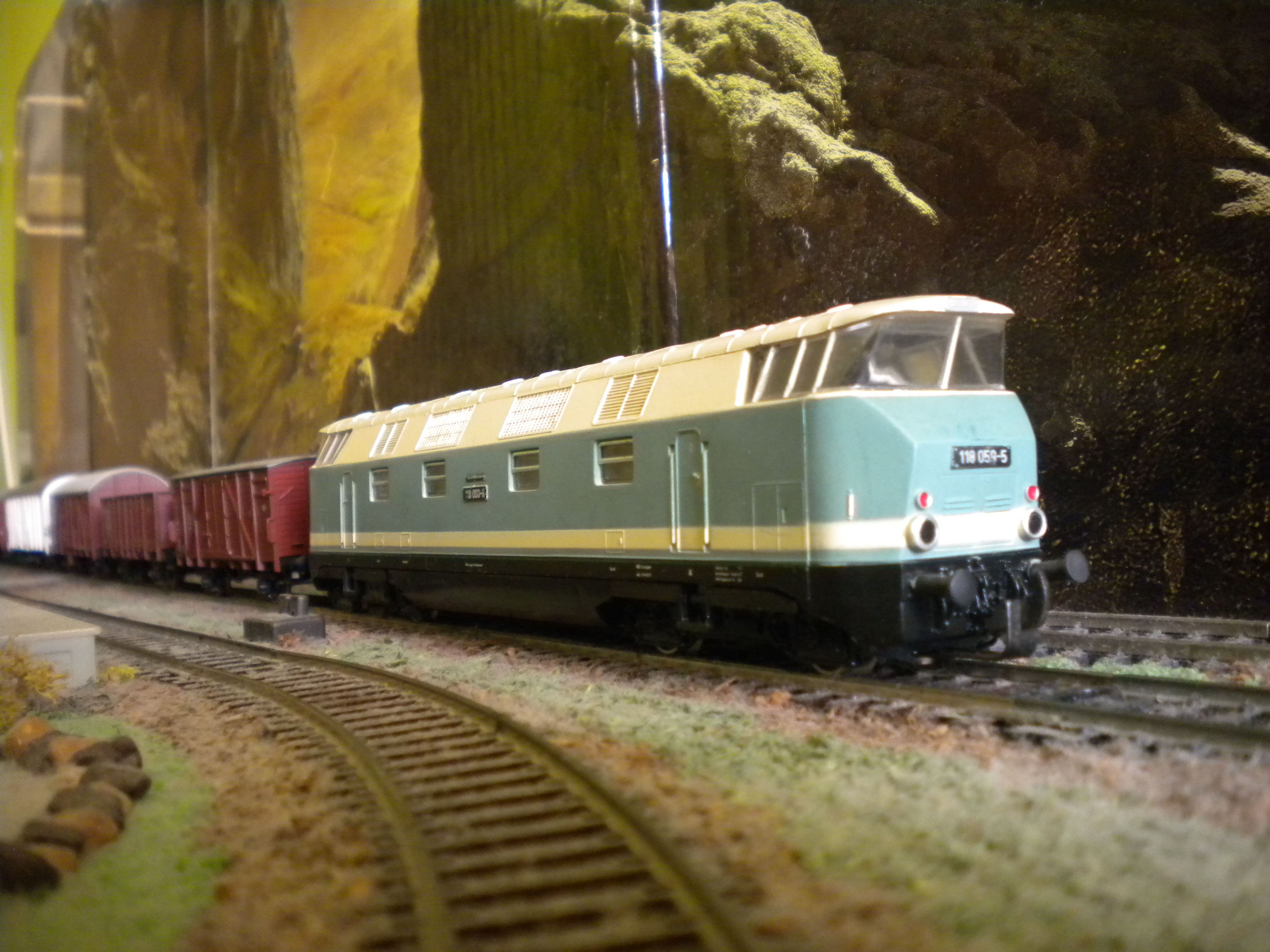 Diesellokomotive 118 059 Gützold, in dieser Farbe Exportmodell für Versandhäuser